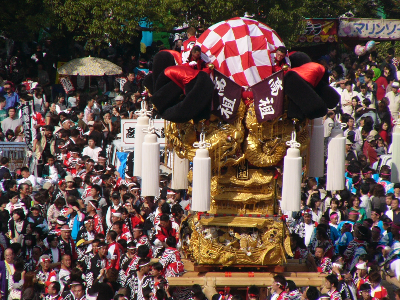 上部地区 高祖太鼓台（2007/10/17撮影）